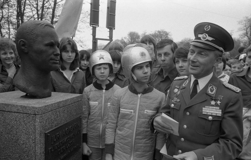 Berlin, Sigmund Jähn vor Büste Juri Gagarins ADN-ZB/Junge/10.4.81/Berlin: In Anwesenheit von Fliegerkosmonaut Sigmund Jähn - hier im Gespräch mit Jungen Pionieren - wurde im Hain der Kosmonauten in Treptow aus Anlaß des Tages der Kosmonauten und des 20. Jahrestages des ersten bemannten Weltraumfluges eine Büste Juri Gagarins enthüllt. Abgebildete Personen: Jähn, Sigmund: Kosmonaut des Raumschiffes Sojus 31, DDR (GND 118556533)